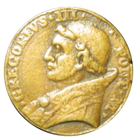 Paps Medaille Gregor III - Avers